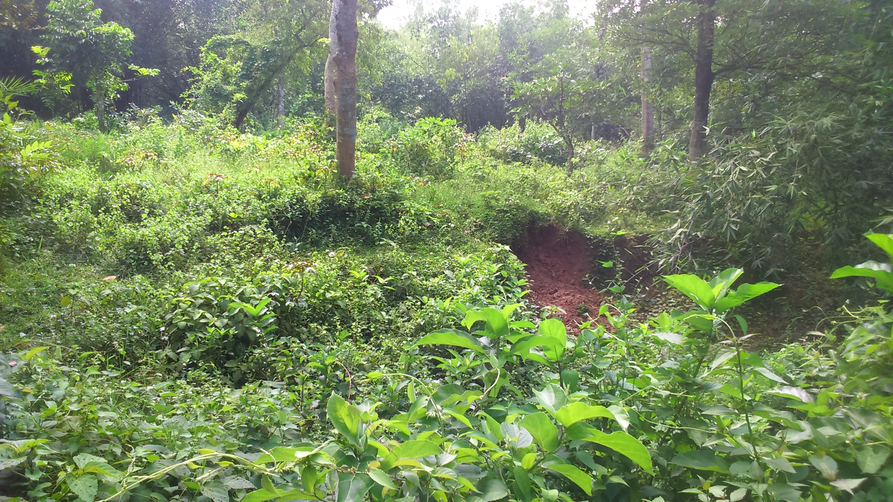 সন্ন্যাসীর ধাপ- ২নং (বড় টেংরার ধাপ)